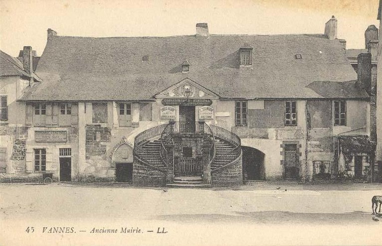 Vannes, ancienne mairie vers 1900 - Carte postale ancienne